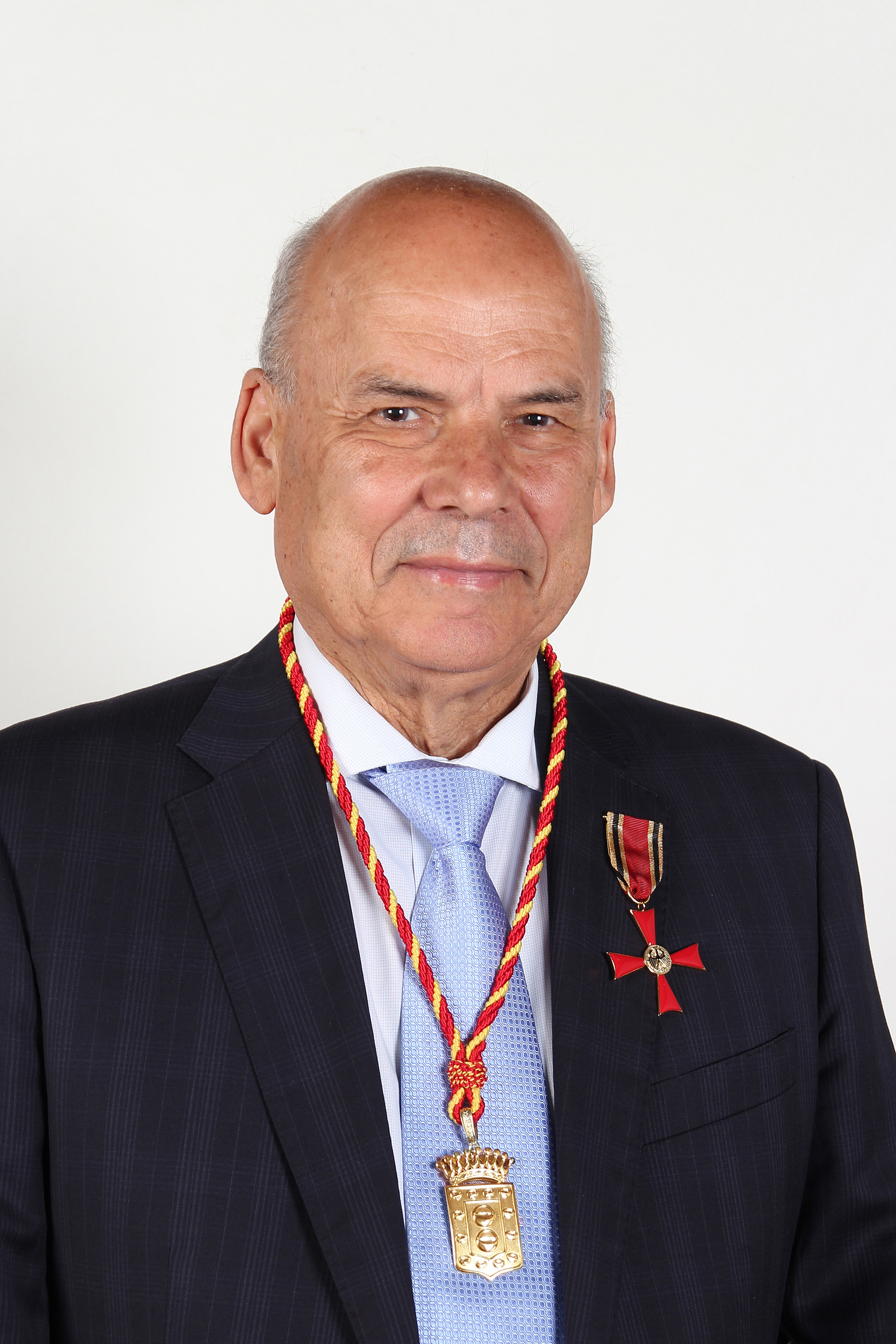 El biólogo español Luis Herrera Mesa, Hijo Predilecto de La Gomera.